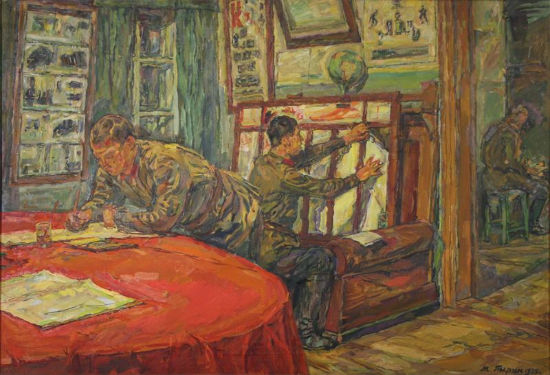 картина "Красноармейцы за составлением стенгазеты", 1933г., художник Пырин Михаил Семёнович (1874 –1943)